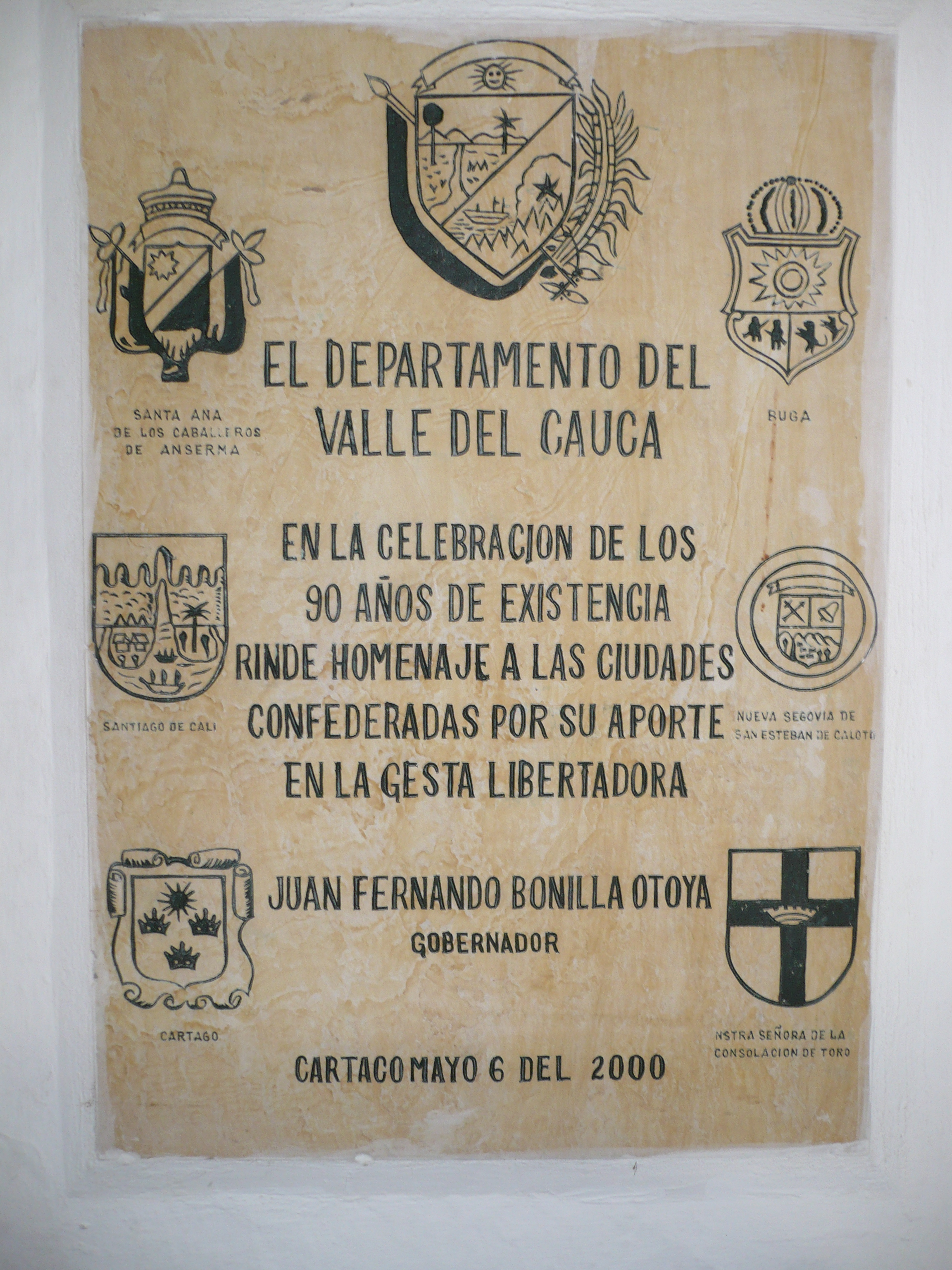 Placa de Homenaje a las Ciudades Confederadas del Departamento del Valle del Cauca (1 de febrero de 1811), colocada en el Interior de la Casa del Virrey. Cartago, Valle del Cauca, Colombia.